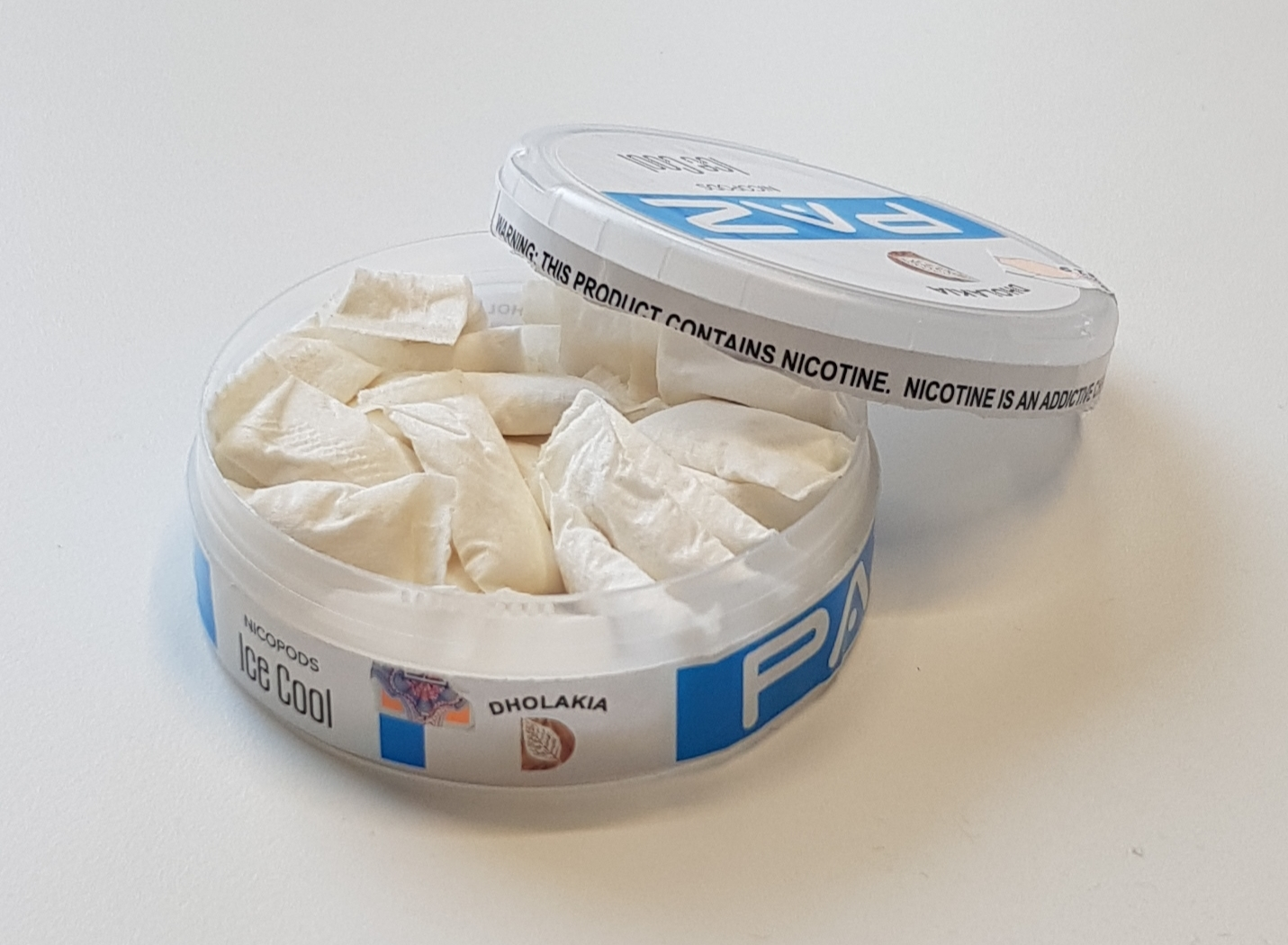 Tubakavaba valge snus